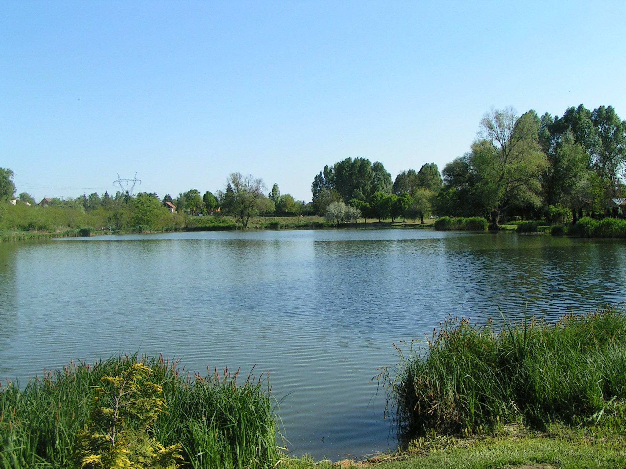 Fóti-tó